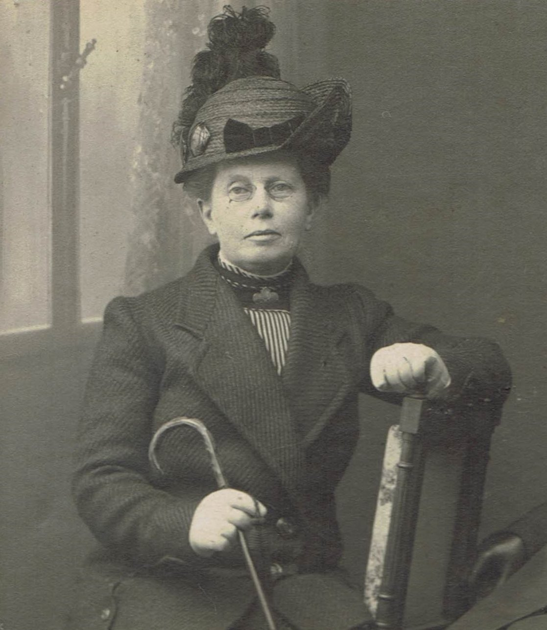 Anna Clasina Leijer, fotografe uit 19de eeuws Den Helder, afgebeeld met haar schoonzuster Hillegonda